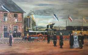 Eröffnungszug der Pfälzischen Ludwigsbahn in Bexbach 1849